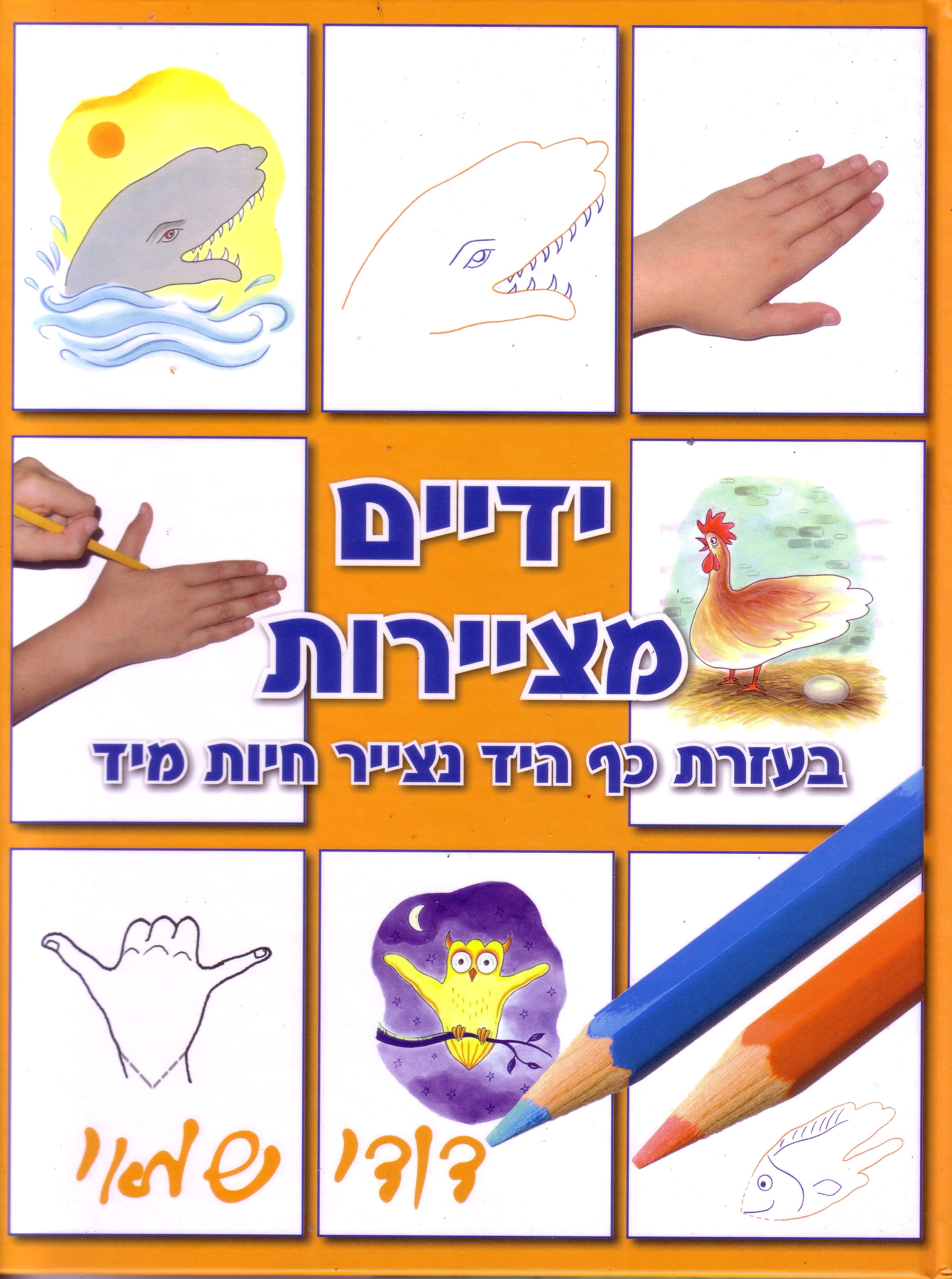 כריכת הספר ידיים מציירות